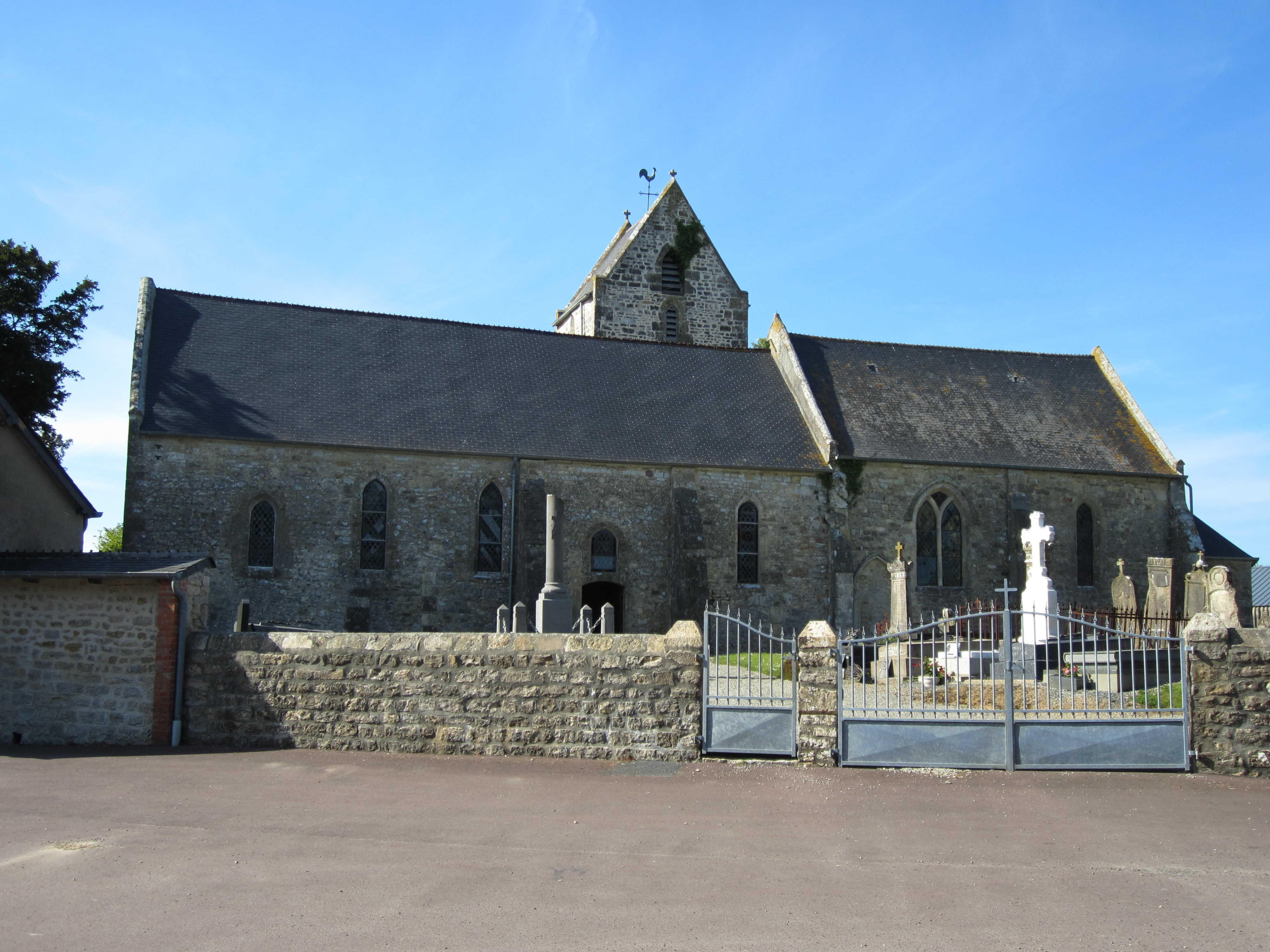 Église Saint-Pierre de Biniville